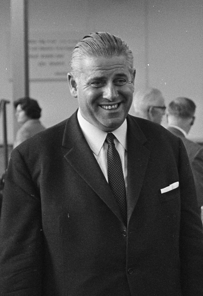 Speelgoedbeurs in de RAI. Burgemeester Neurenberg, dr. Urschlechter.